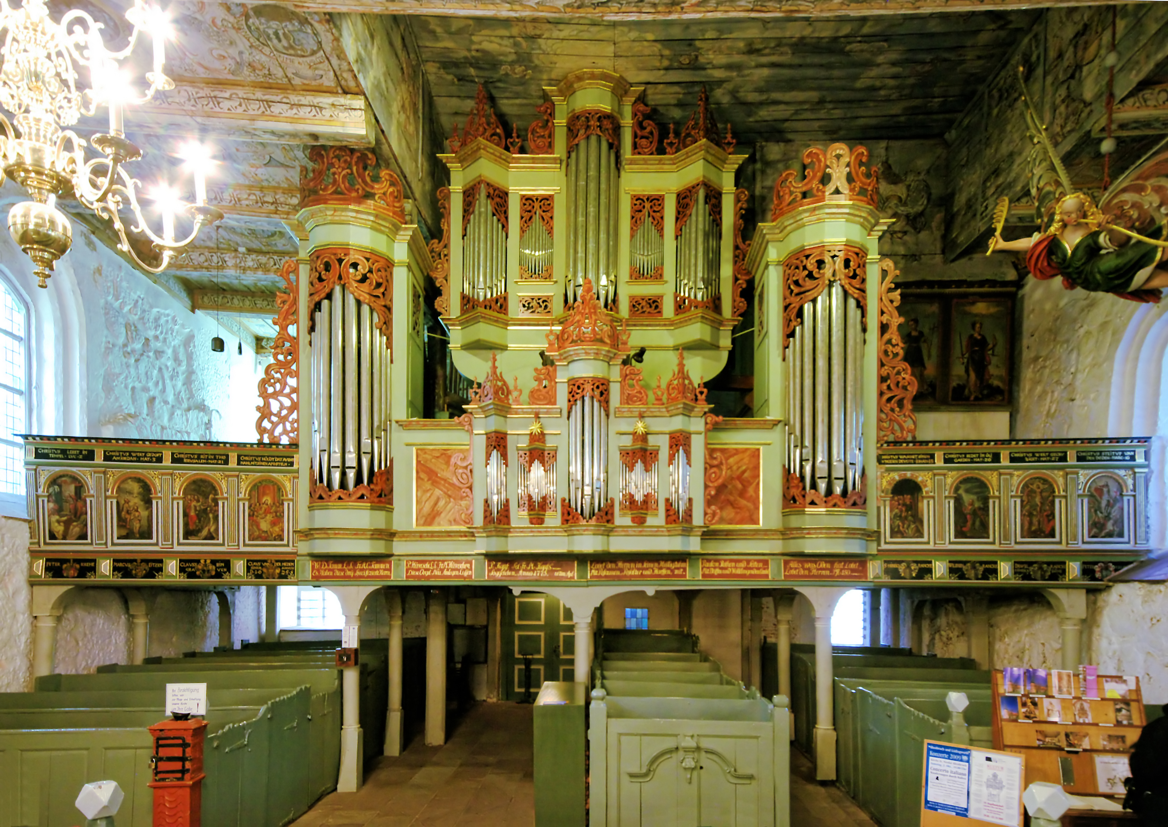 Die Orgel